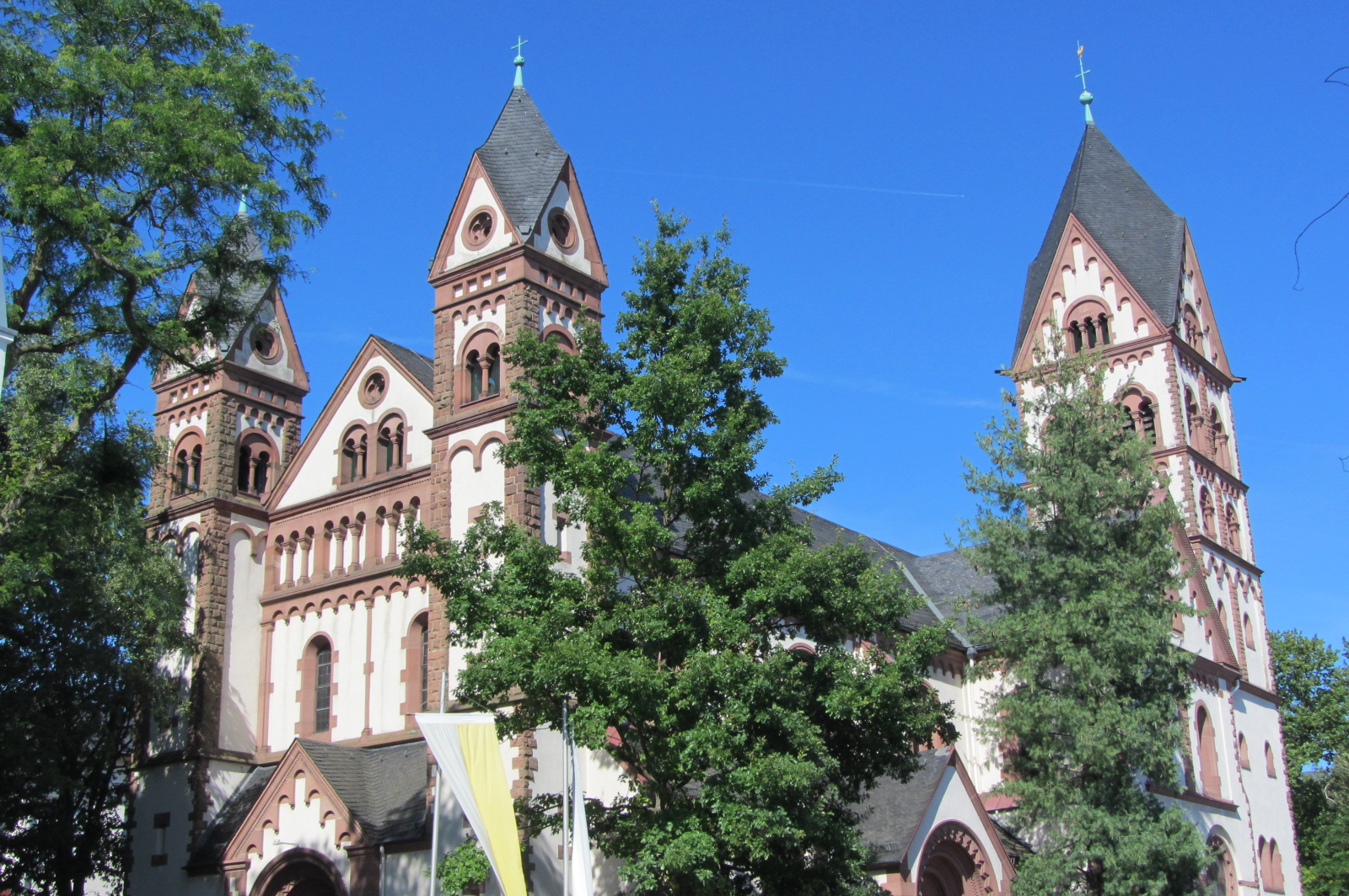 Die katholische St. Josephskirche in Frankfurt-Eschersheim